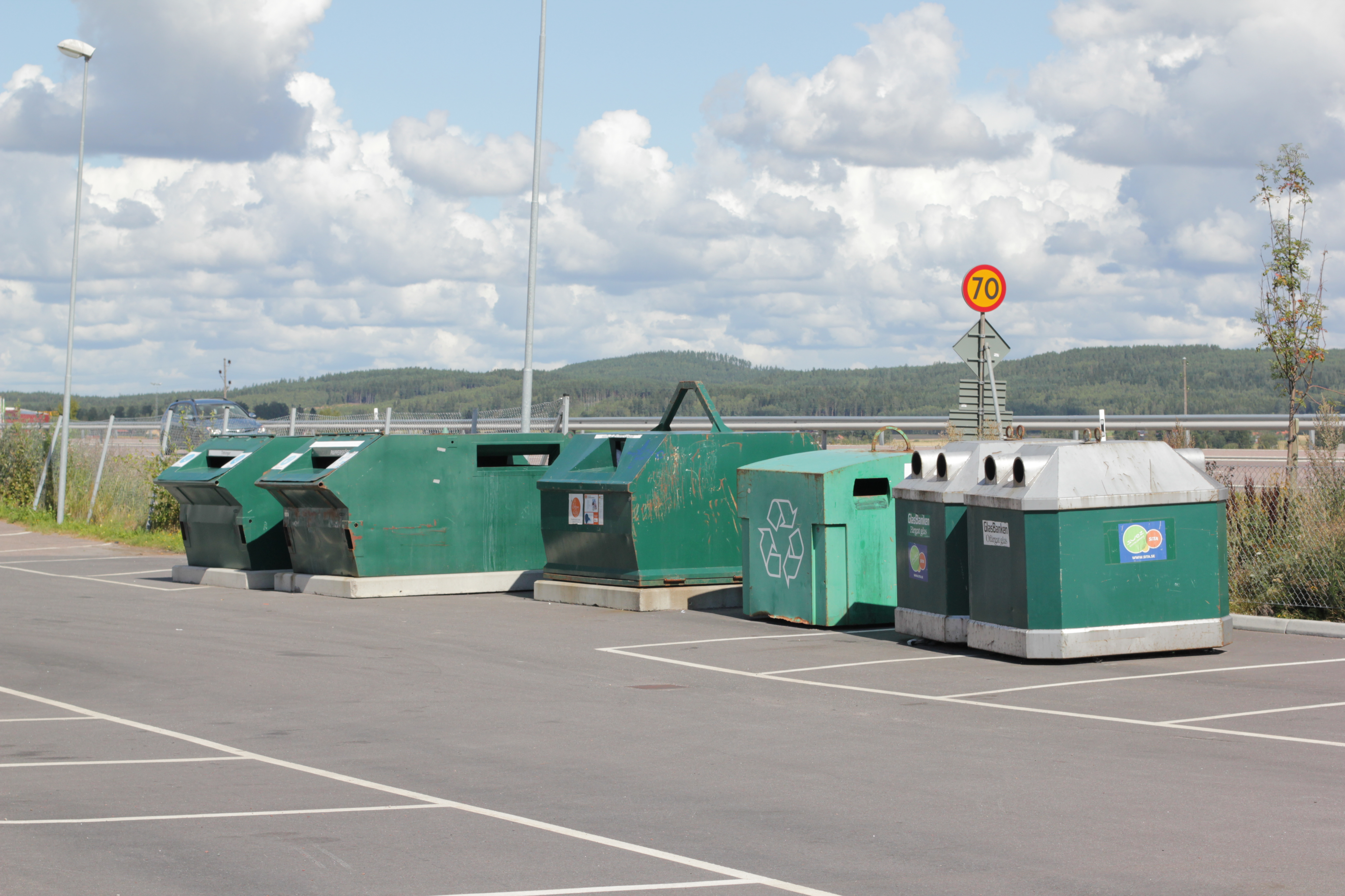 Återvinningsstation på ICA-parkeringen i Hedemora, Sverige